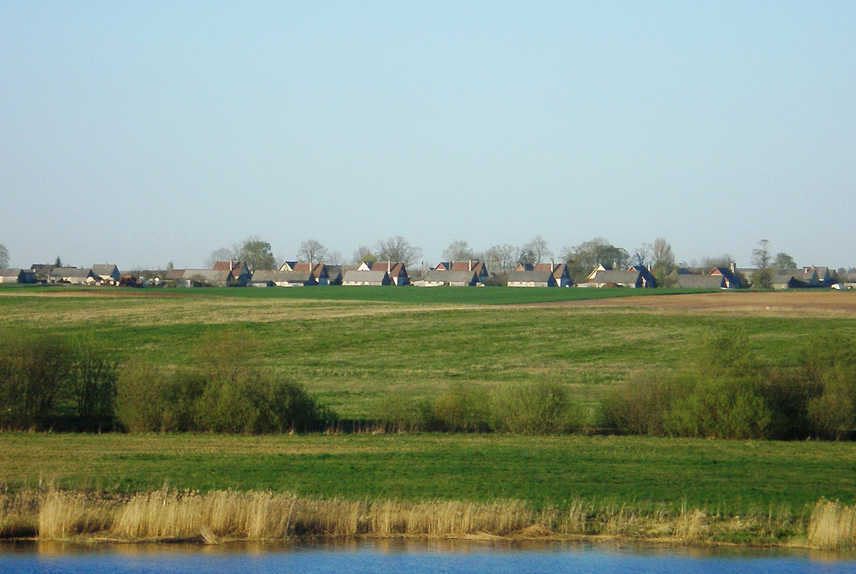 Kairėnai, Grinkiškio sen., Radviliškio raj.